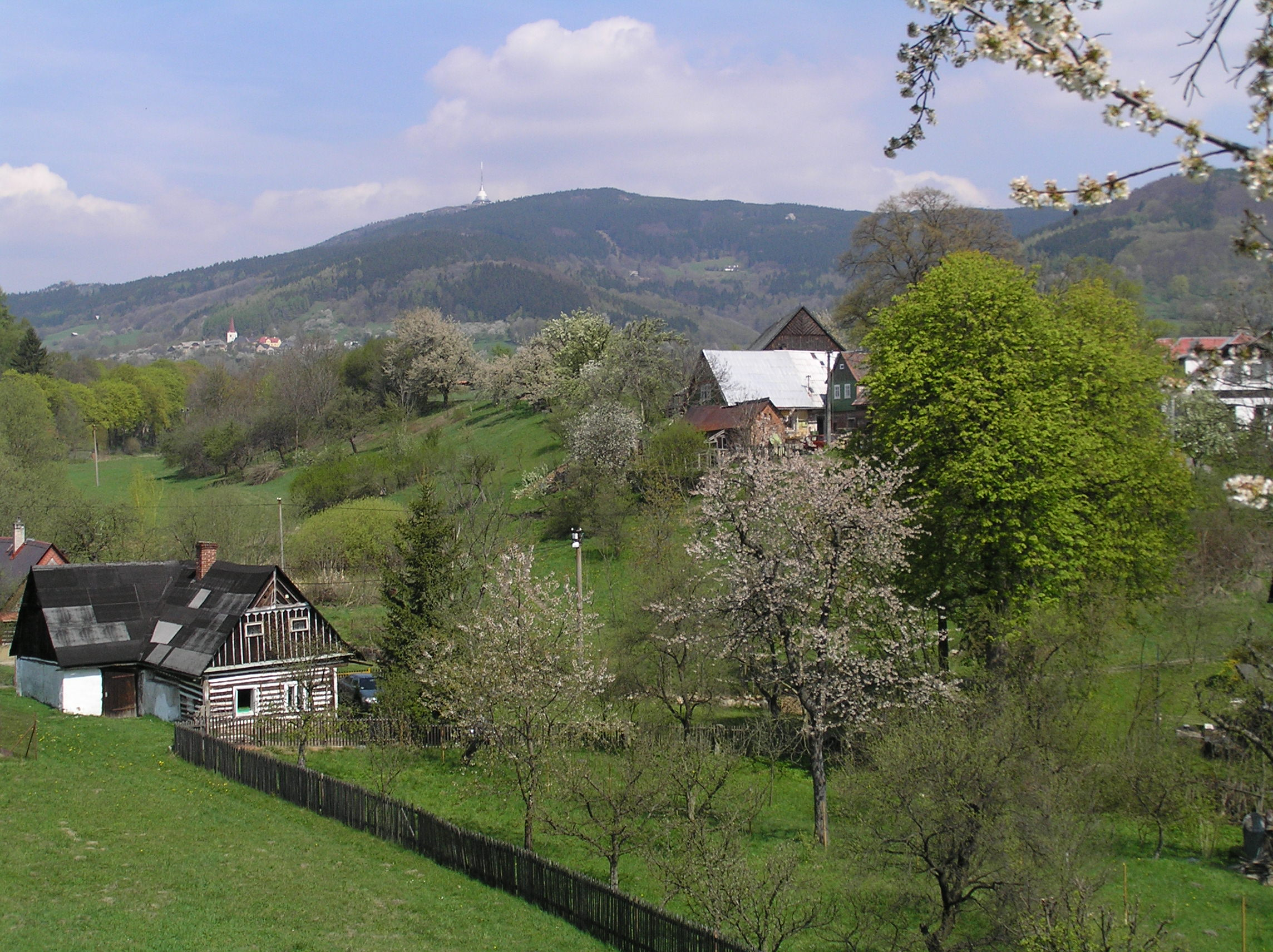 Javorník u Českého Dubu - celkový pohled s Ještědským hřbetem